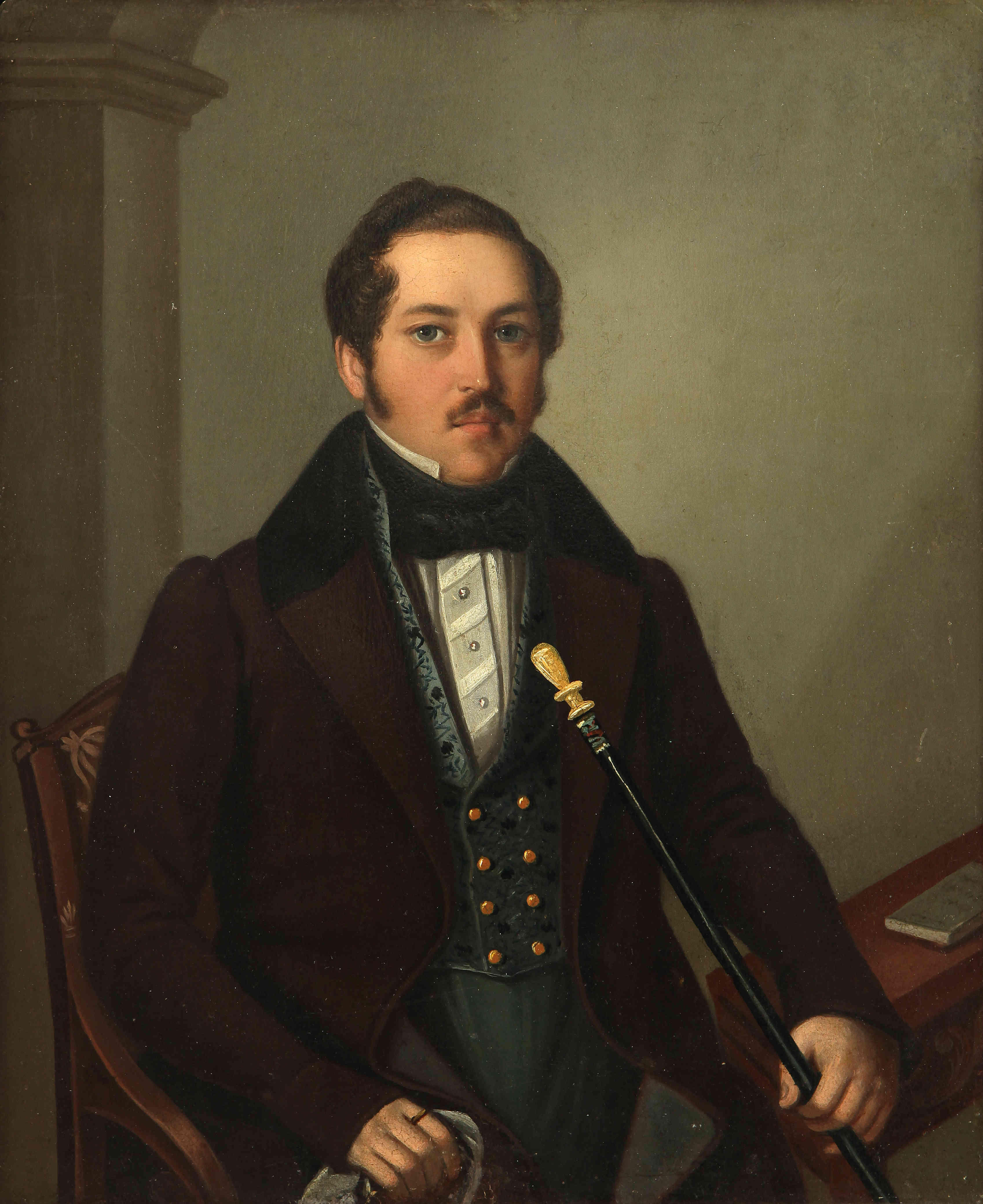 Партрэт невядомага Карсалін Кандрат, 1840-я гг. Метал, алей 31,7×26,5 см Нацыянальны мастацкі музей Рэспублікі Беларусь